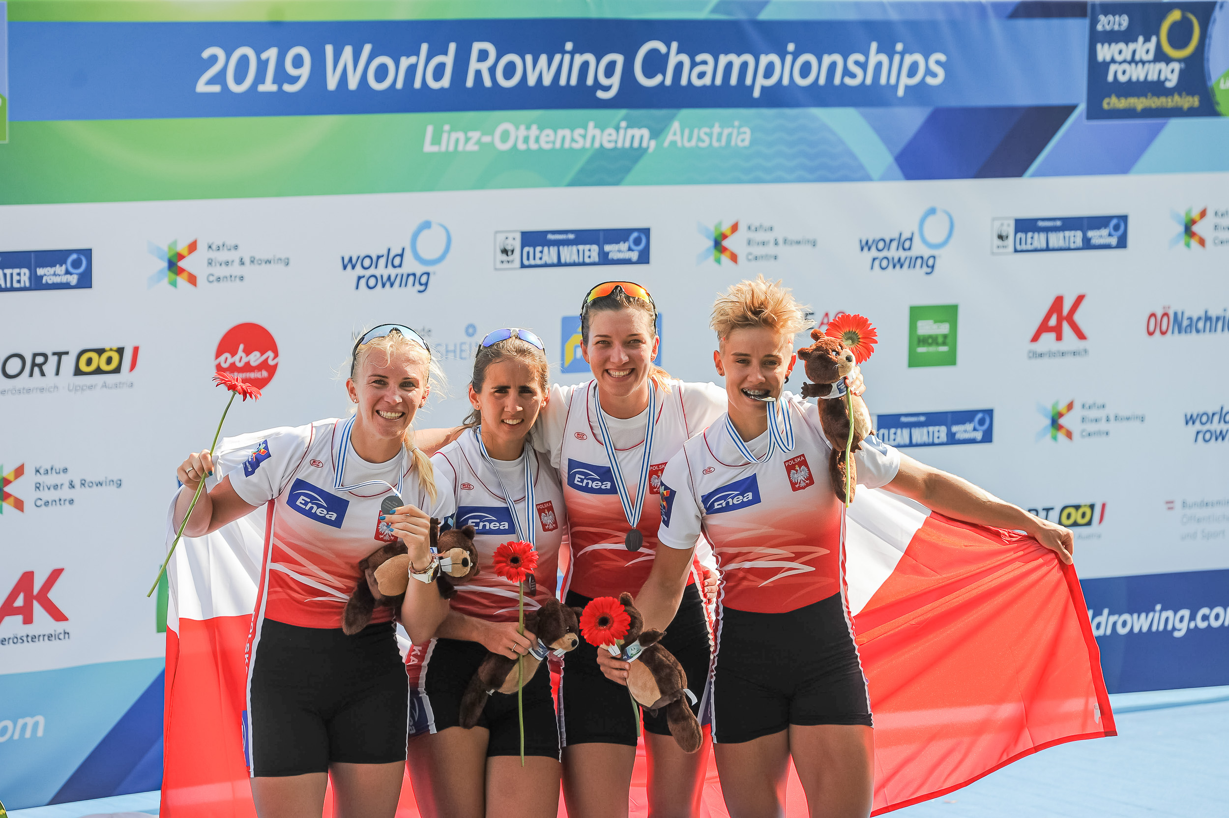 Wicemistrzynie świata na MŚ we wioślarstwie 2019. Od lewej: Agnieszka Kobus-Zawojska, Maria Sajdak (Springwald), Marta Wieliczko oraz Katarzyna Zillmann.